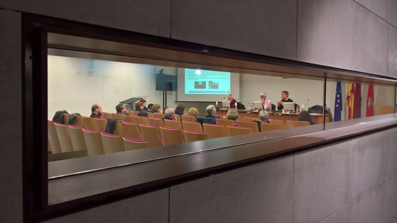 Vista parcial de la reunión de RUID 2-febrero-2017